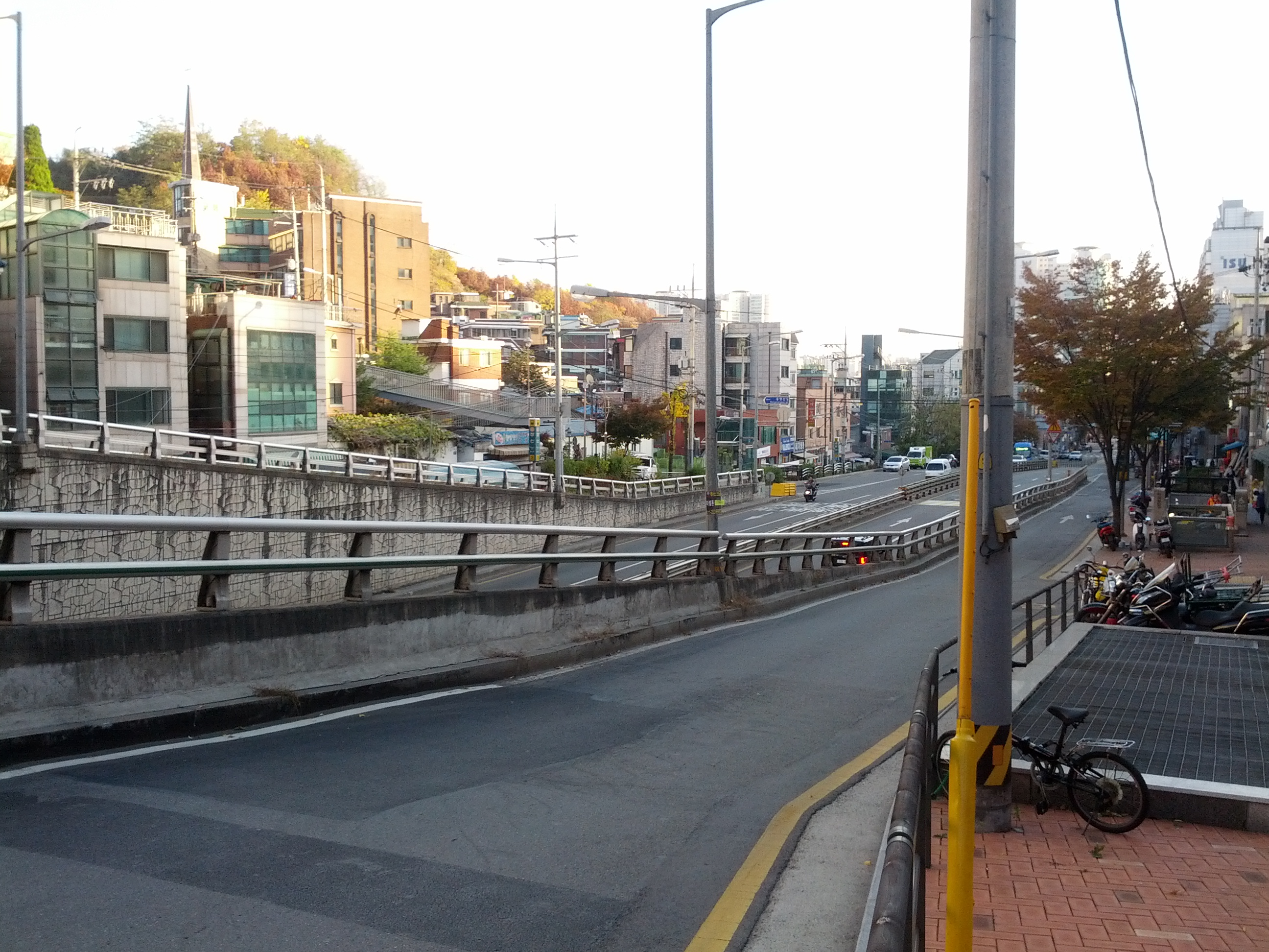 창신역 부근 지봉로